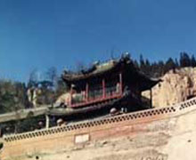 凤山一角；系手机拍摄不太清晰